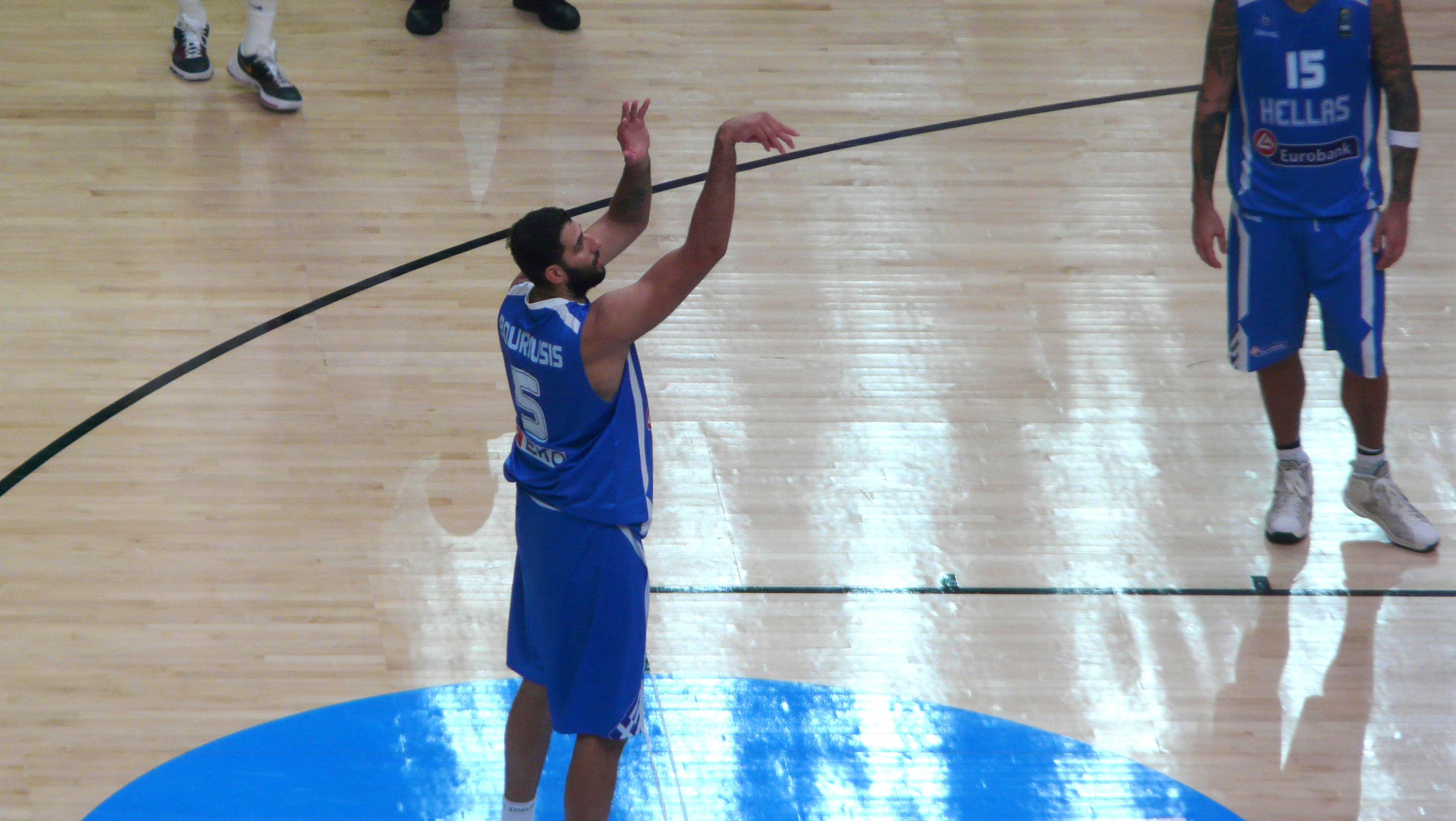 Ioánnis Bouroúsis (#5) au lancer-franc au cours du deuxième quart-temps du quart de finale de l'EuroBasket 2015 entre la Grèce et l'Espagne, le 15 septembre 2015.